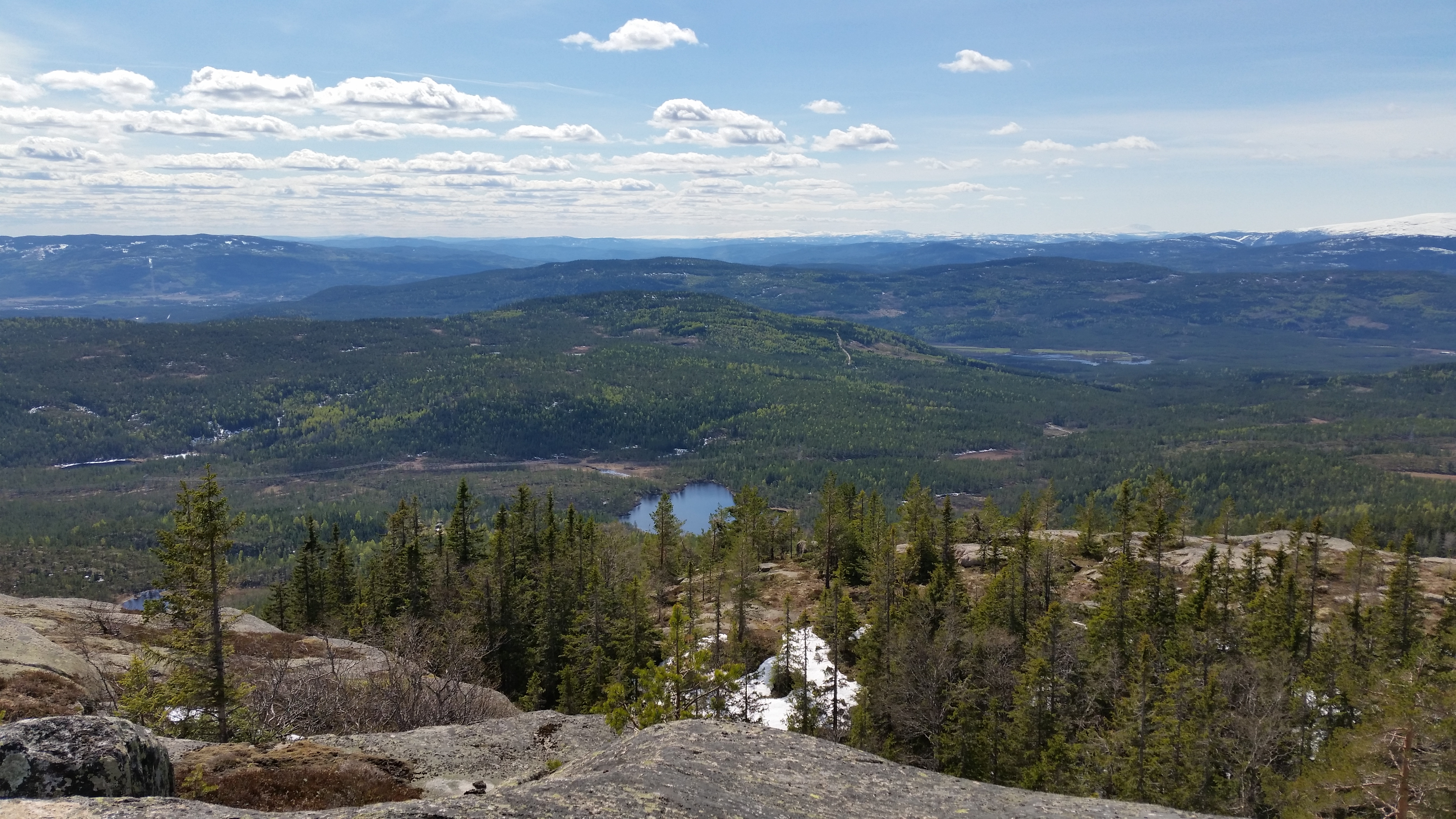 Utsikt vestover fra det høyeste punktet på Hestebrenna. Det nærmeste vannet er Saksentjern. I horisonten sees midt i bildet Blefjell, noe lengre til høyre Gaustatoppen og helt til høyre noe av Norefjell.